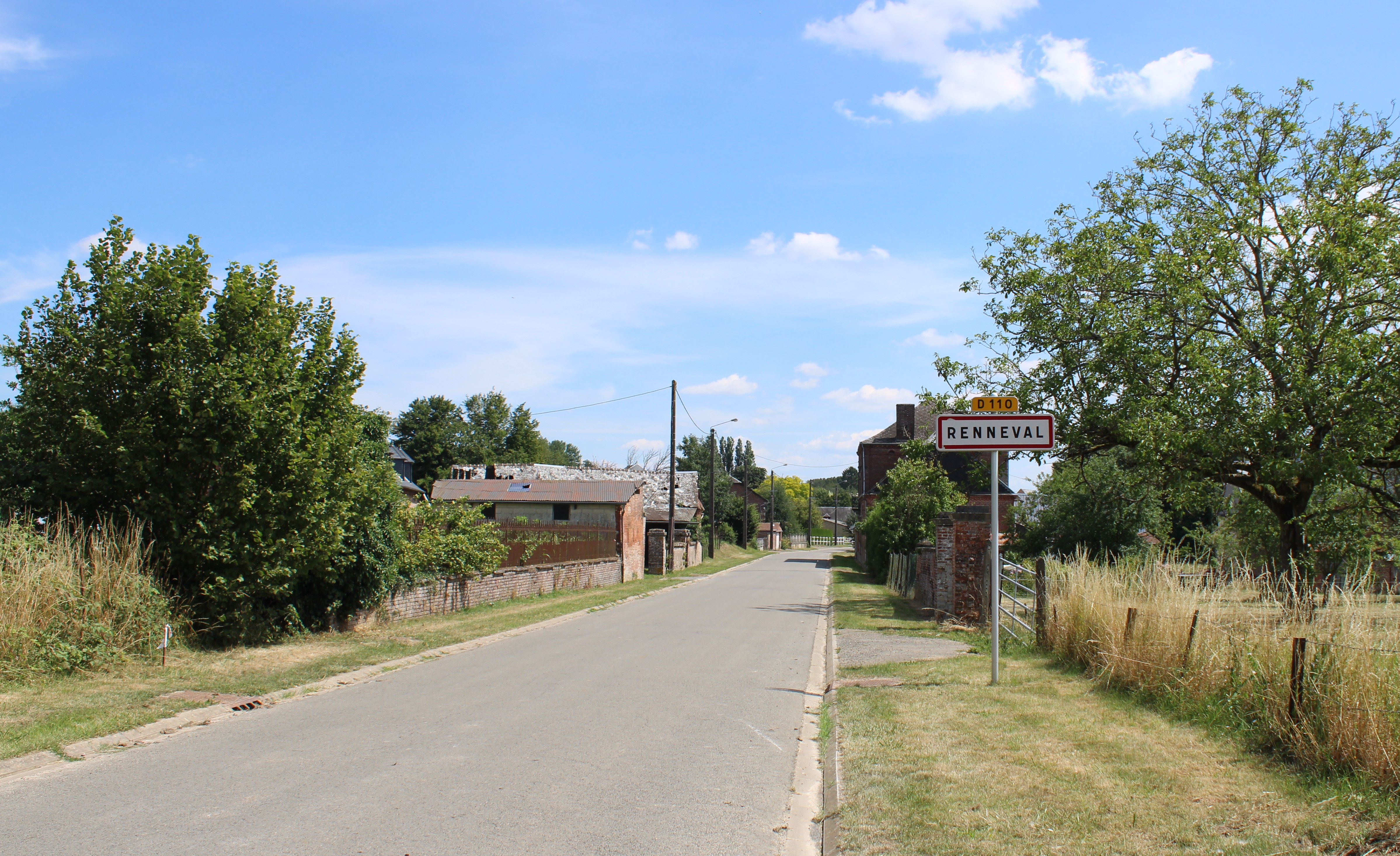 Entrée du village